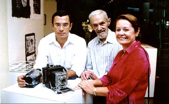 O inventor Sebastião Carvalho Leme durante a exposição "Imagens de Um Pioneiro" e seus filhos Maria Izabel e Eduardo.